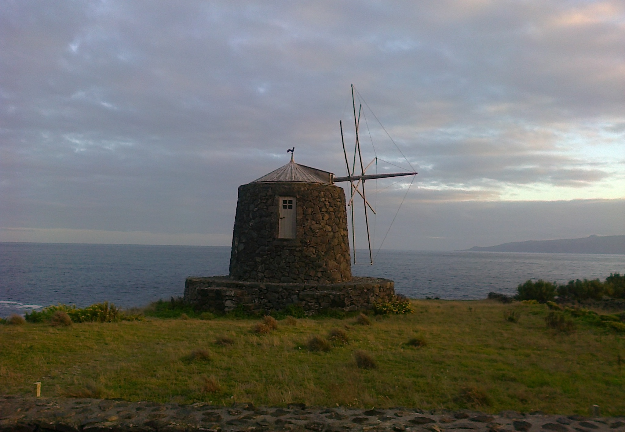 Moinho de vento da Caldeira, Vila do Corvo, ilha do Corvo, Região Autónoma dos Açores, Portugal.